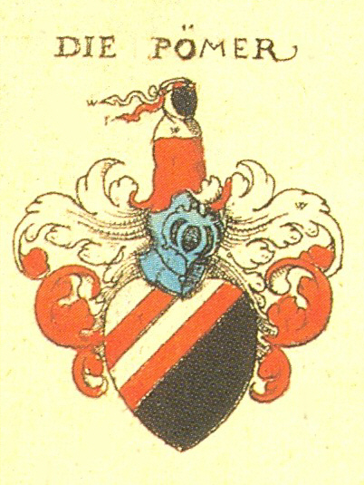 Wappen der Nürnberger Patrizierfamilie Pömer von Diepoltsdorf